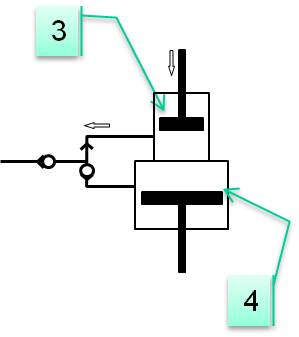 HVA-Hubposition-Oeffnungsnocken